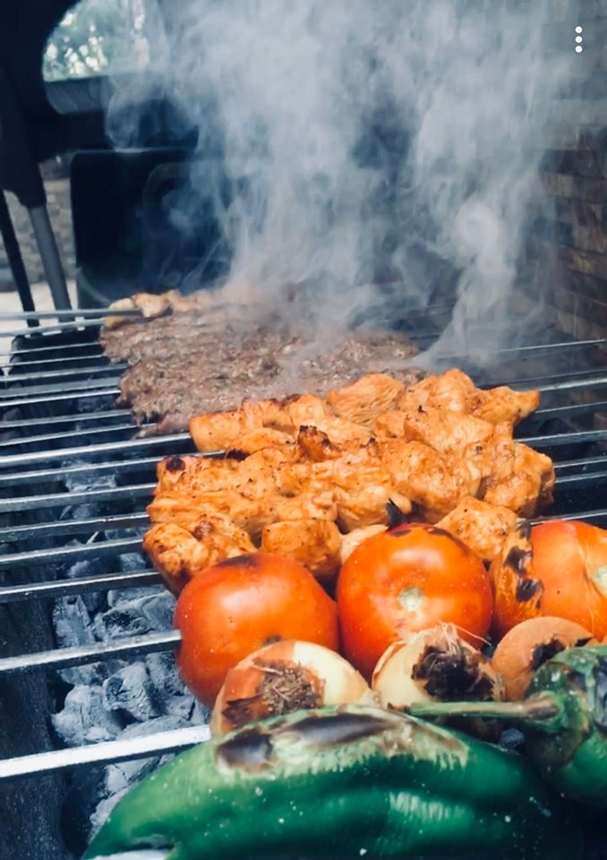 صورة لعملية شواء الكباب والدجاج والخضار على الفحم -حيث يطلق على دمج الخضار والكباب عند عملية الشواء مصطلح الكباب الملوكي